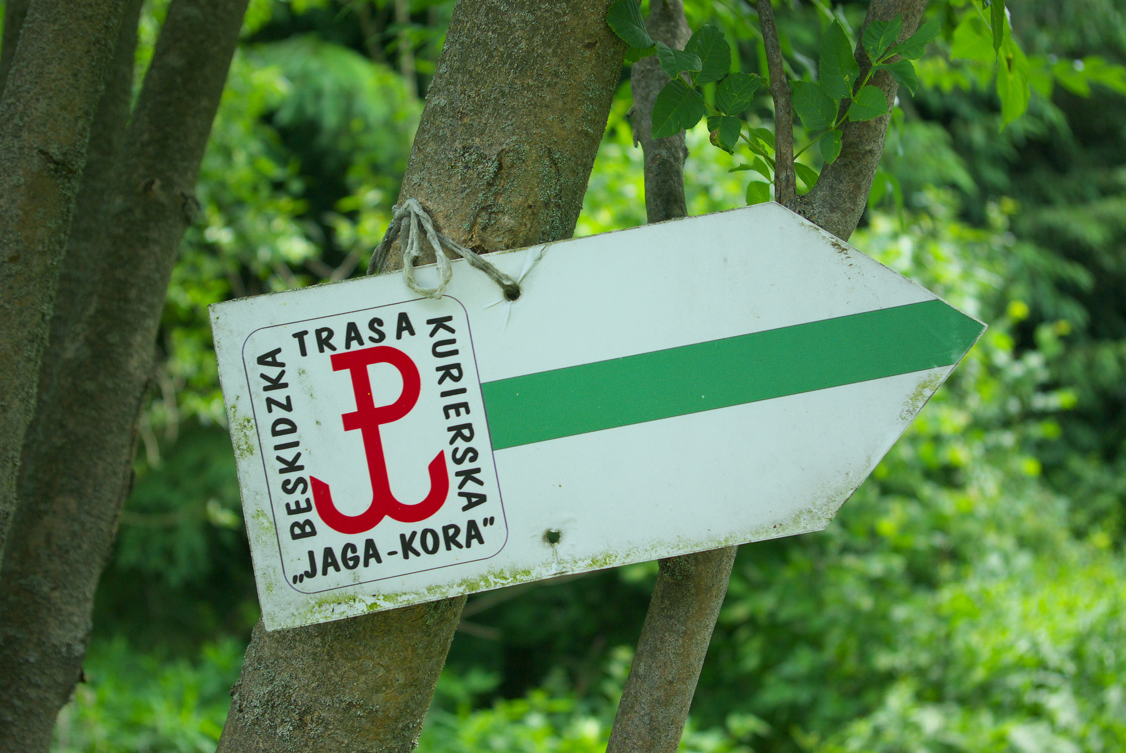 Odznaczenie Beskidzkiej Trasy Kurierskiej „Jaga–Kora”.